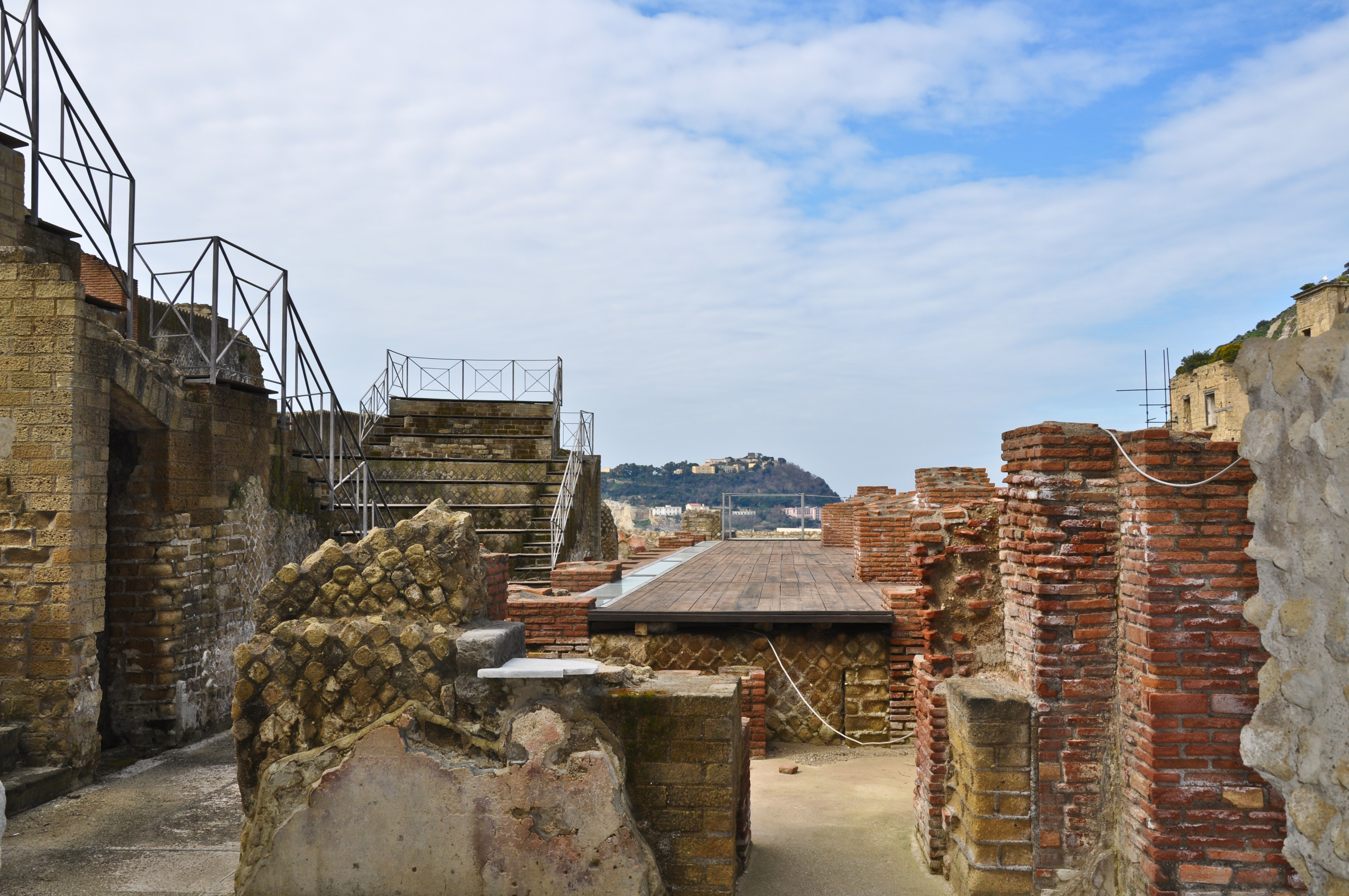 Napoli - Parco archeologico del Pausilypon